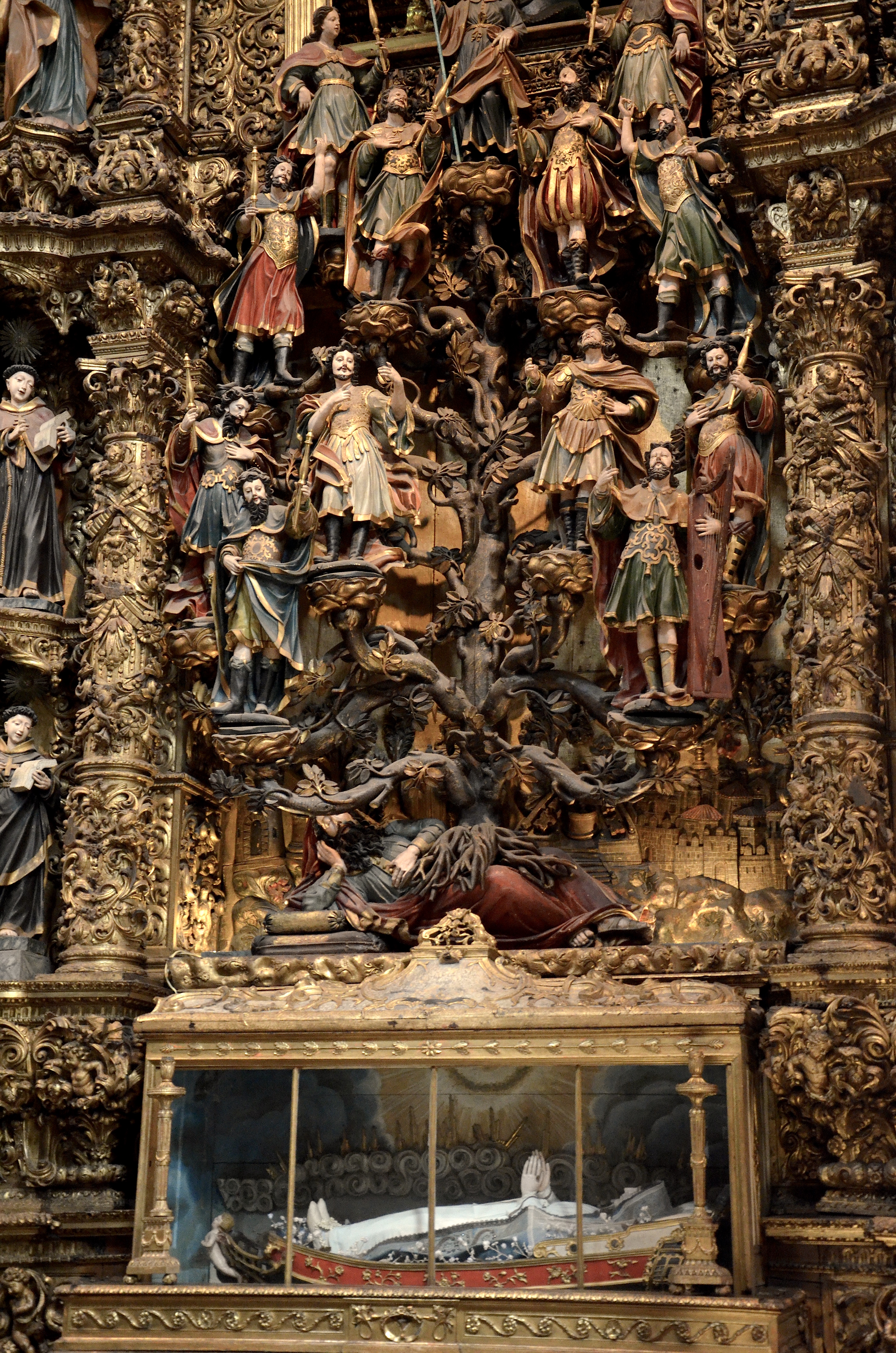 Chiesa di San Francesco Tags: portugal porto oporto portogallo